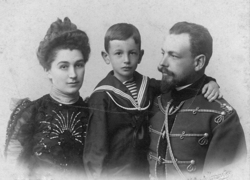 Евгений Николаевич Волков с женой Верой Александровной и сыном Николаем СПб, ок. 1900